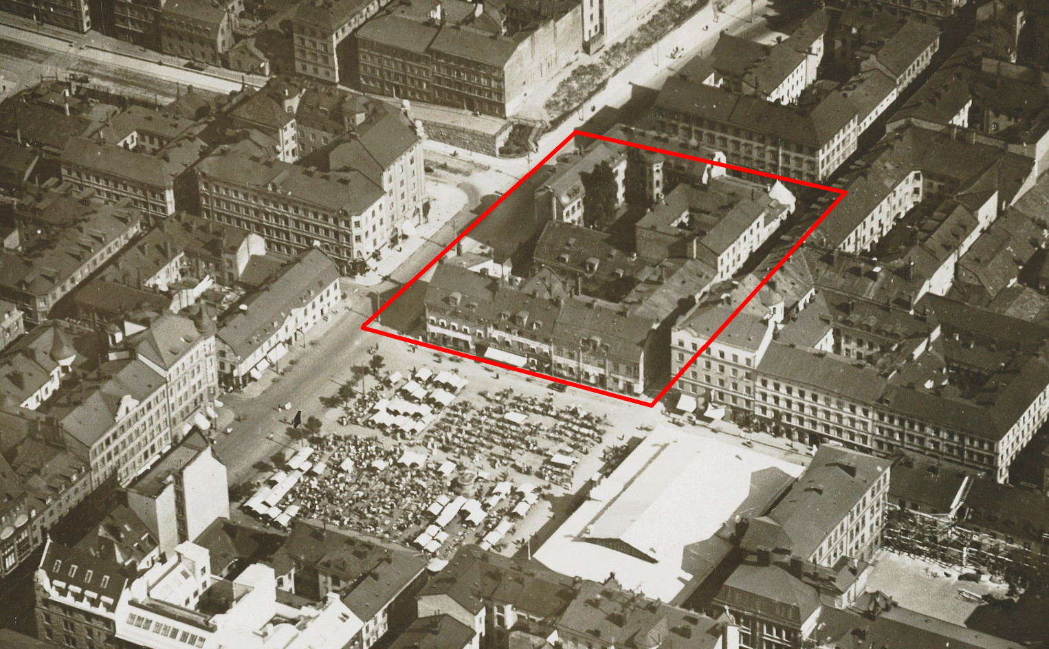 Tomten för blivande Konserthuset i Stockholm, i mitten syns Hötorget och till vänster Kungsgatan. Sveavägen kommer in i övre vänstre bildhörn och slutar vid Kungsgatan.